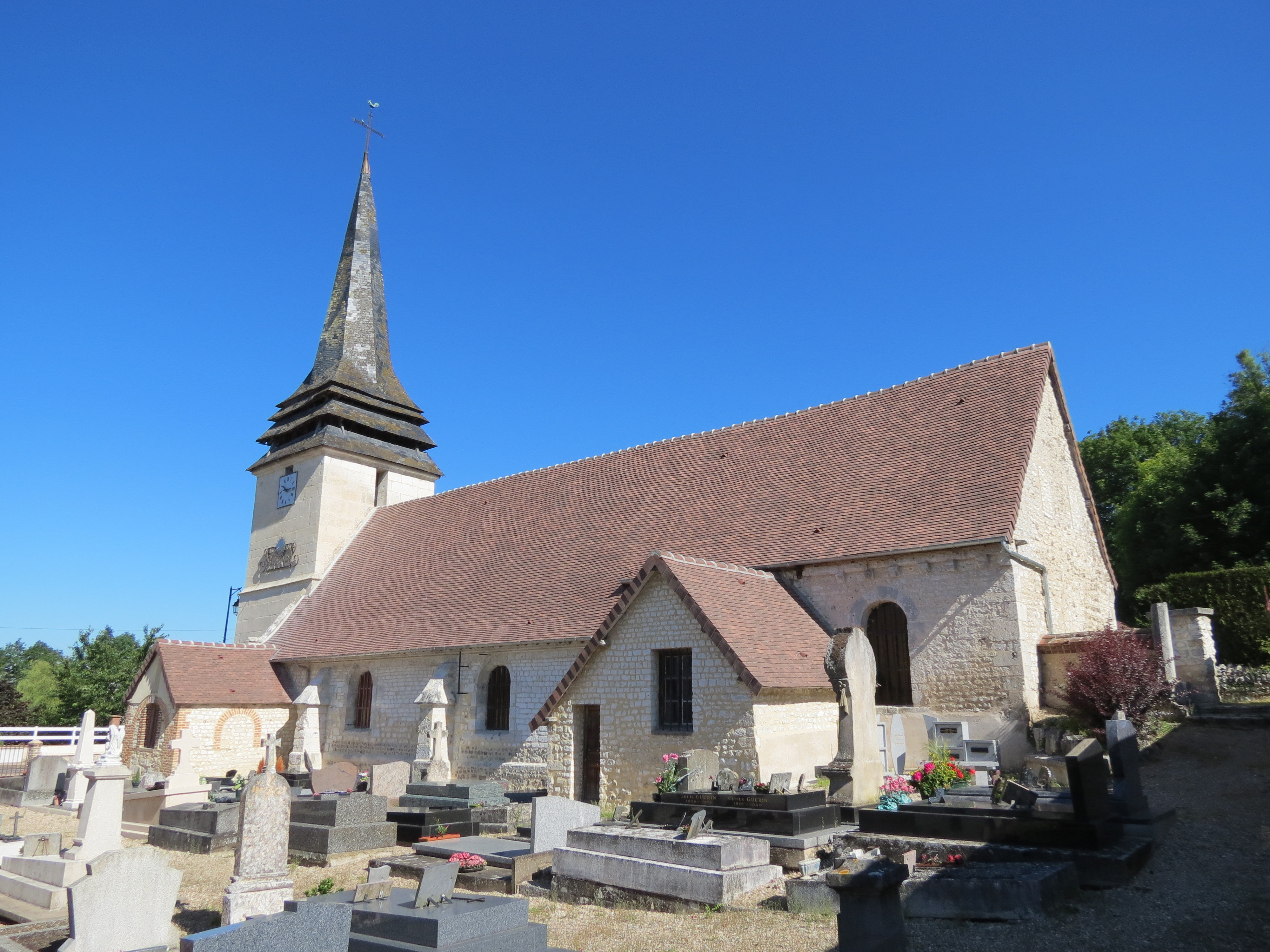 Église Saint-Vaast de Connelles